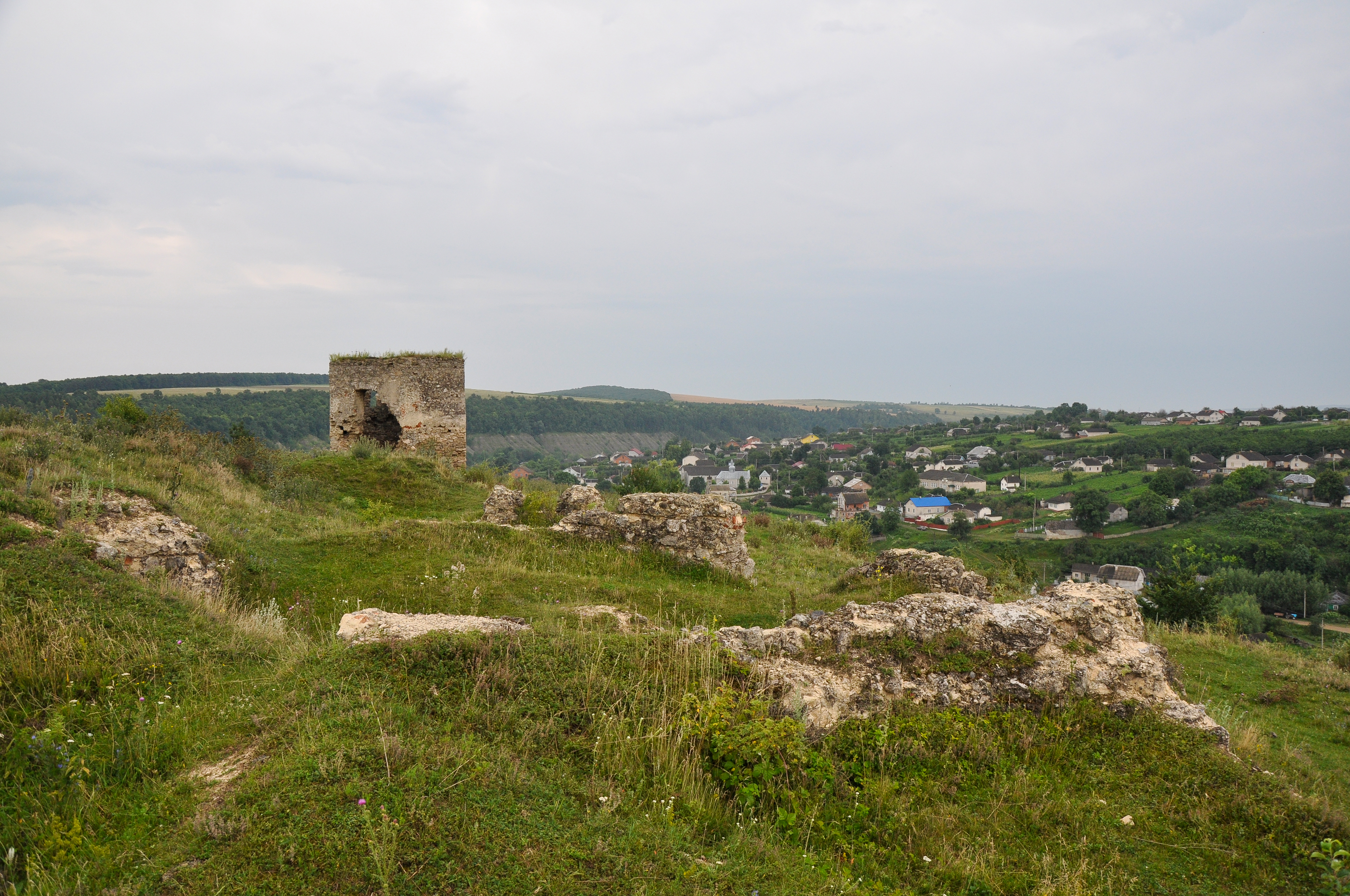 Замок (руїни), Висічка